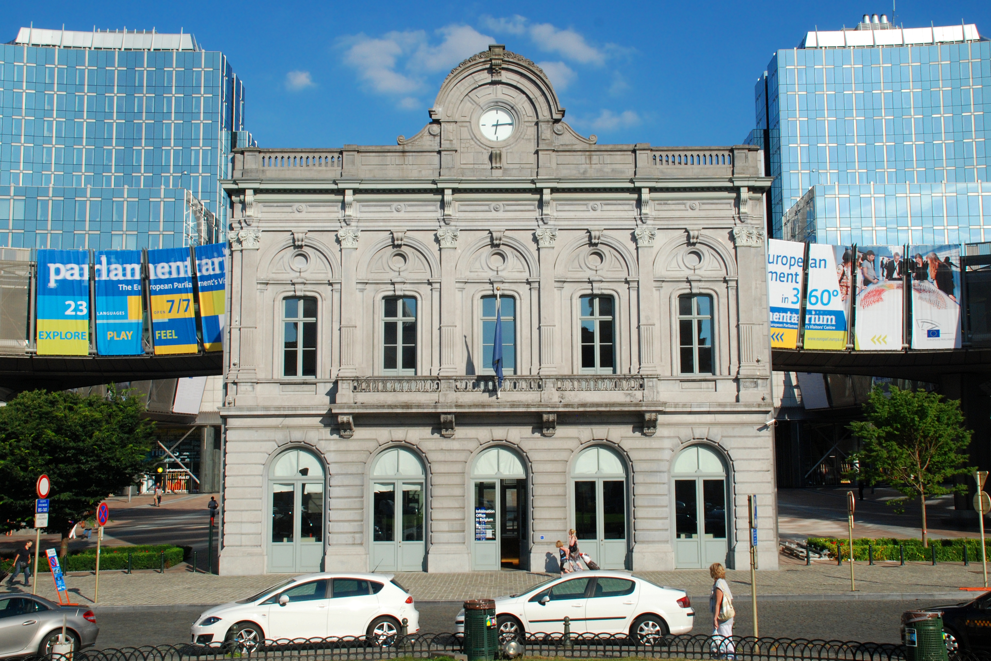 Belgique - Bruxelles - Ancienne gare de Bruxelles-Quartier-Léopold (architecte Gustave Saintenoy - éclectisme)